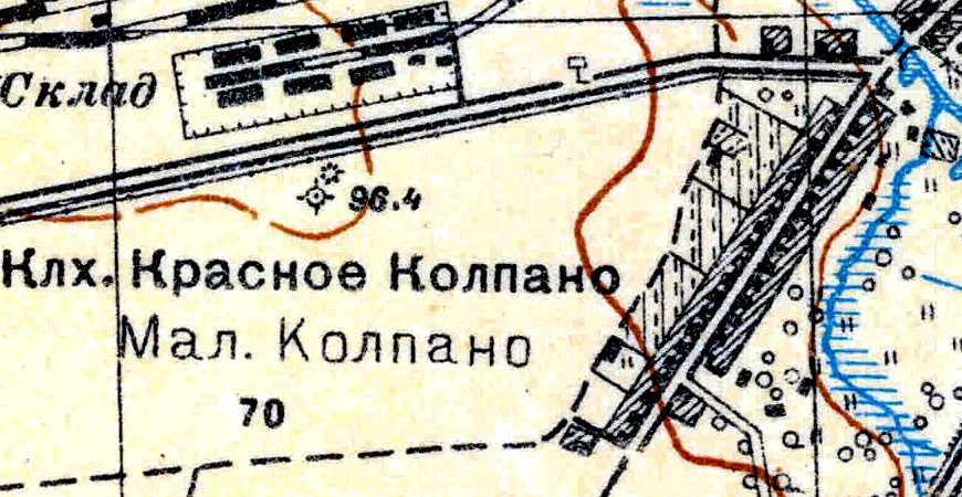 Топографическая карта Ленинградской области, квадрат О-36-13-А-в (Красногвардейск), деревня Малые Колпаны